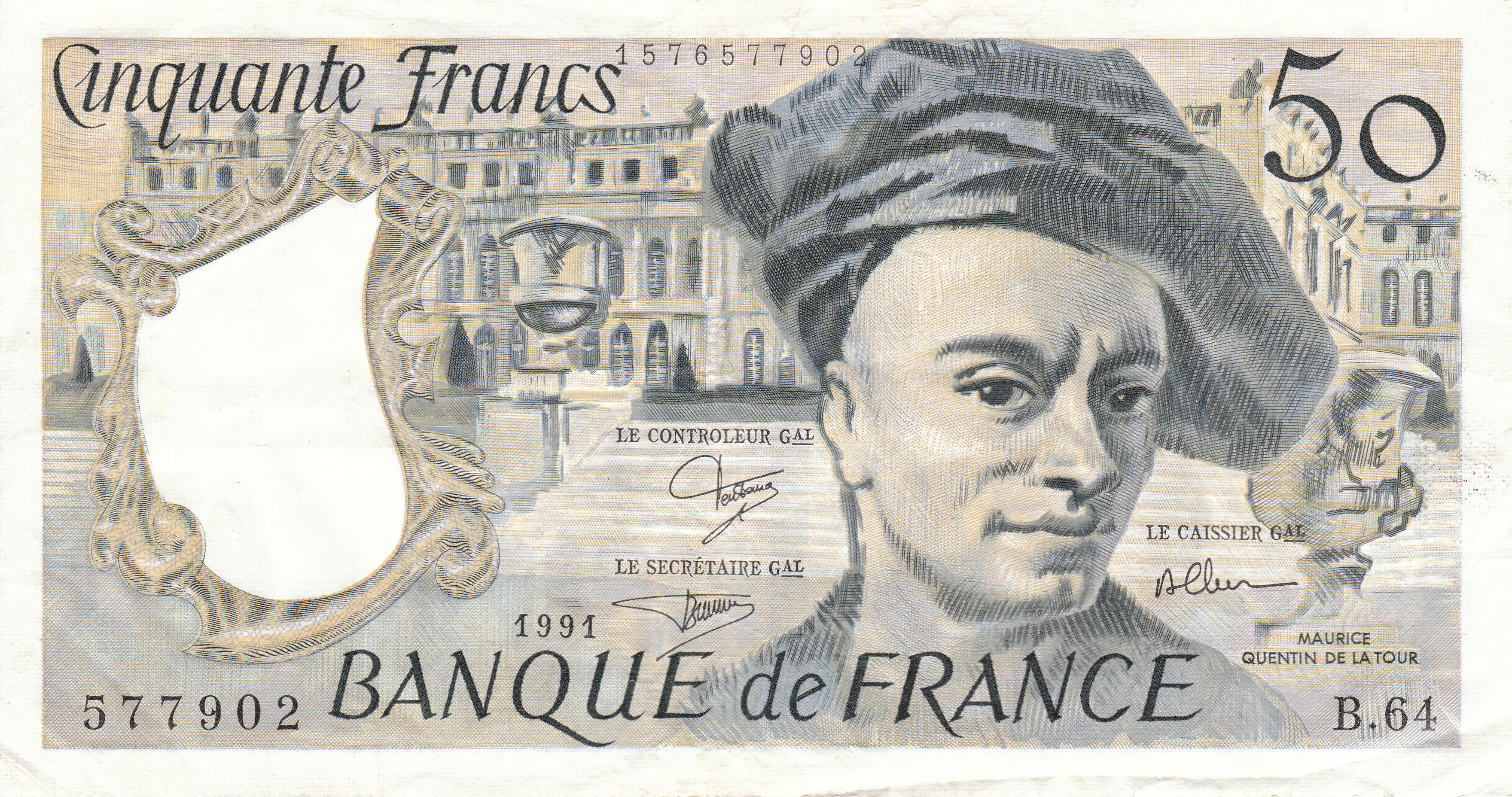 50 francs Quentin de La Tour (1991)